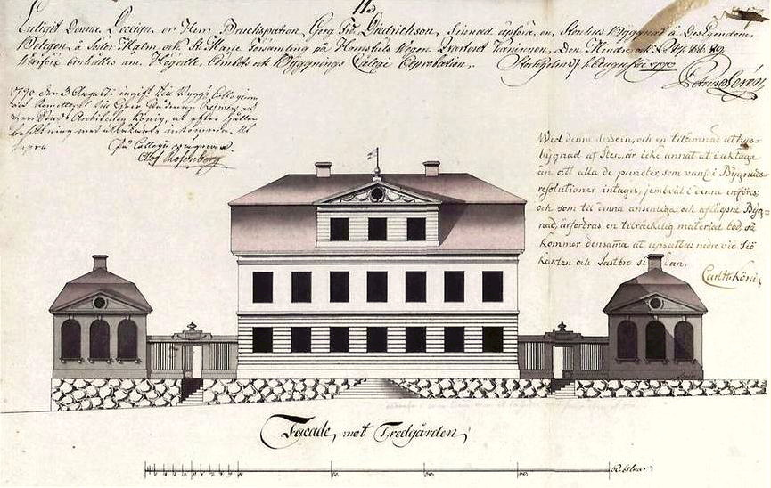 Kristinehovs Malmgård byggdes 1790 för grosshandlaren Georg Fredrik Diedrichson efter ritningar av slottsmurmästaren Petrus Serén